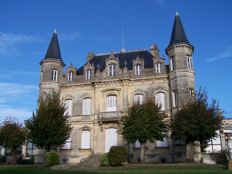 Chateau la Séguinie